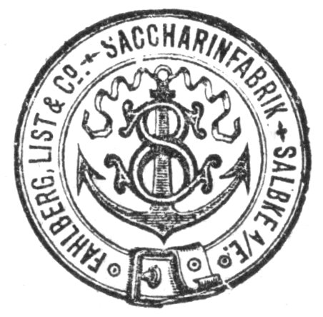 Fabrik-Marke der Fahlberg, List & Co. Salbke-Westerhüsen